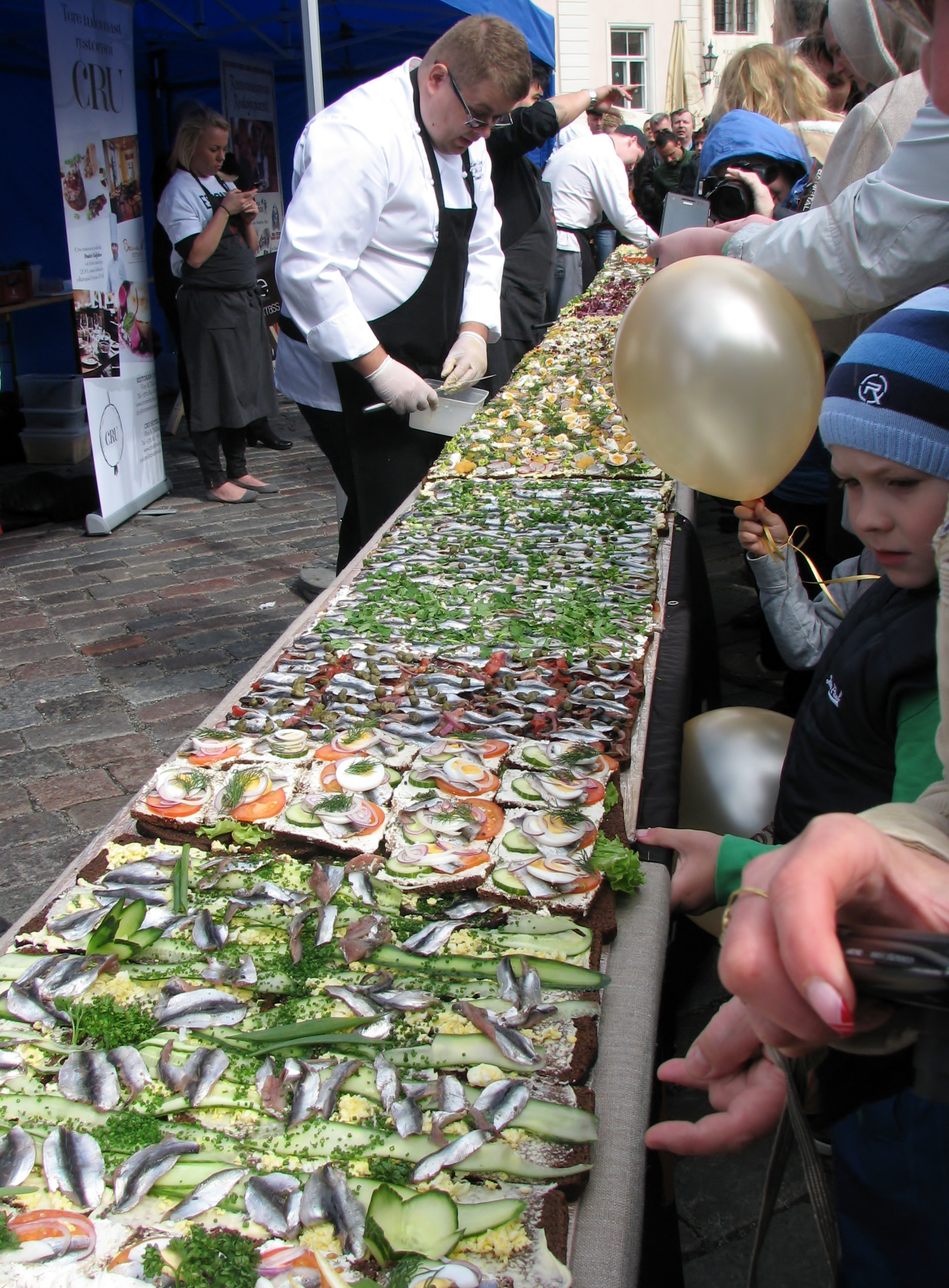 Tallinna päeva avaürituse raames Raekoja platsil valmistatud maailma pikim kiluvõileib